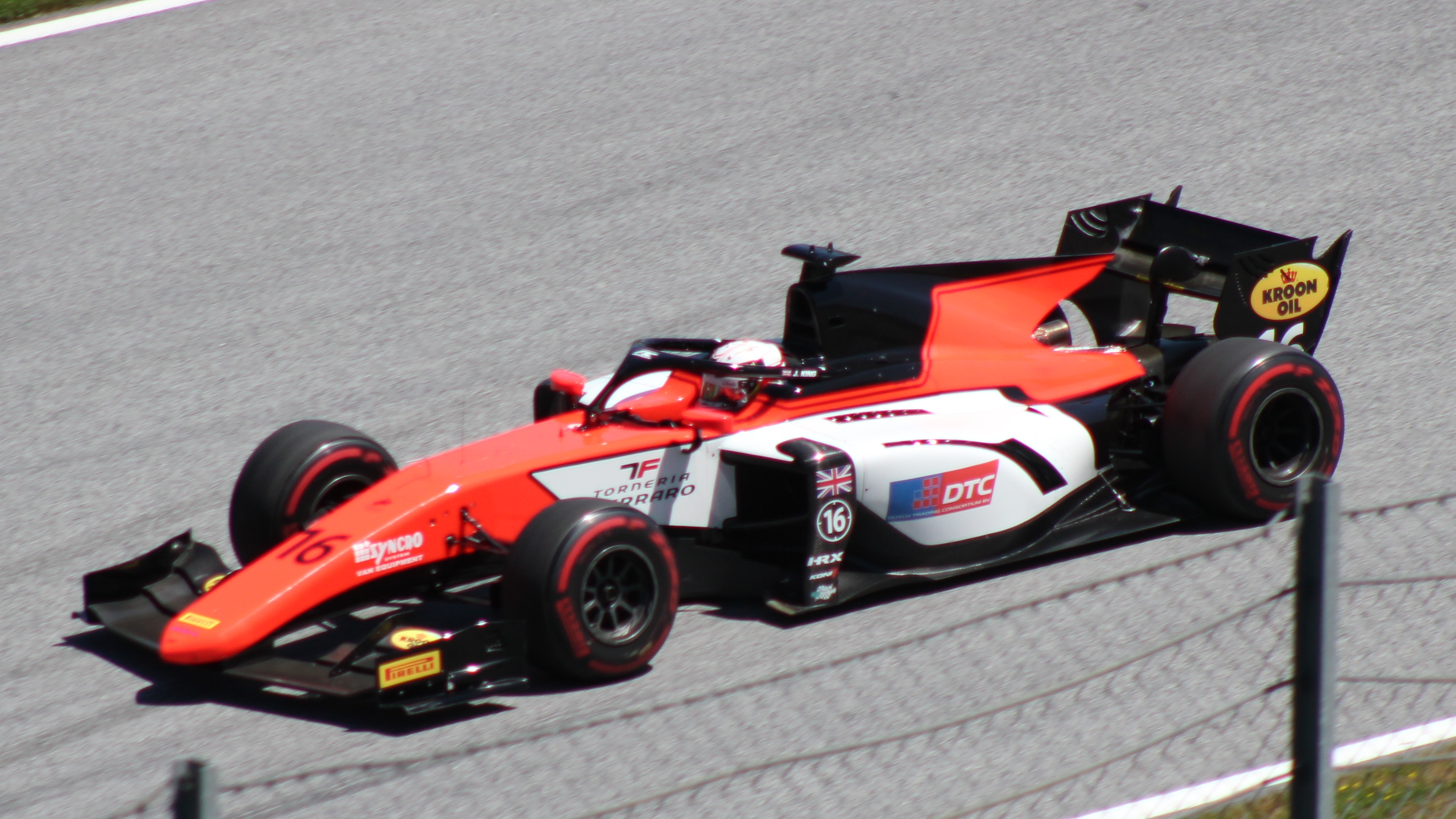 King beim Rennwochenende in Österreich 2019